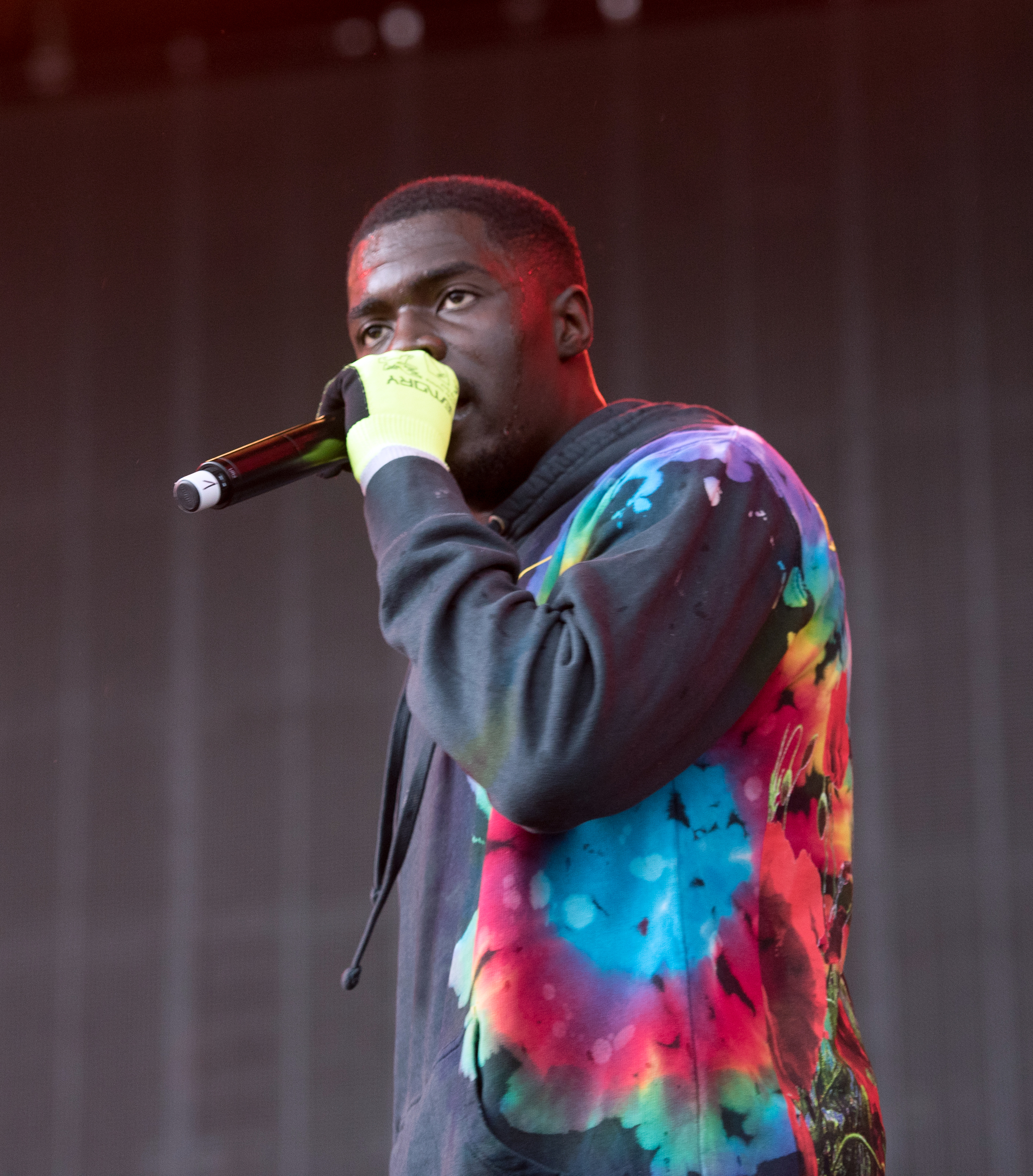 Sheck Wes live auf dem Openair Frauenfeld 2019